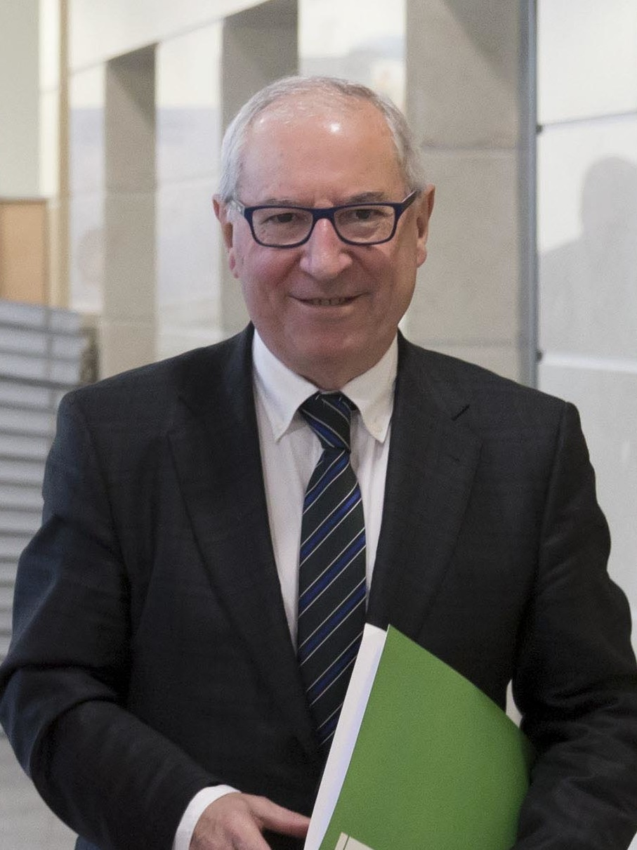 La vicepresidenta ha señalado que las precipitaciones en Cantabria se han reducido un 10% en los últimos 30 años y el número de días con temperaturas superiores a los 25 grados se han duplicado en 60 años